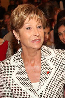 Fotos del seminario y debate